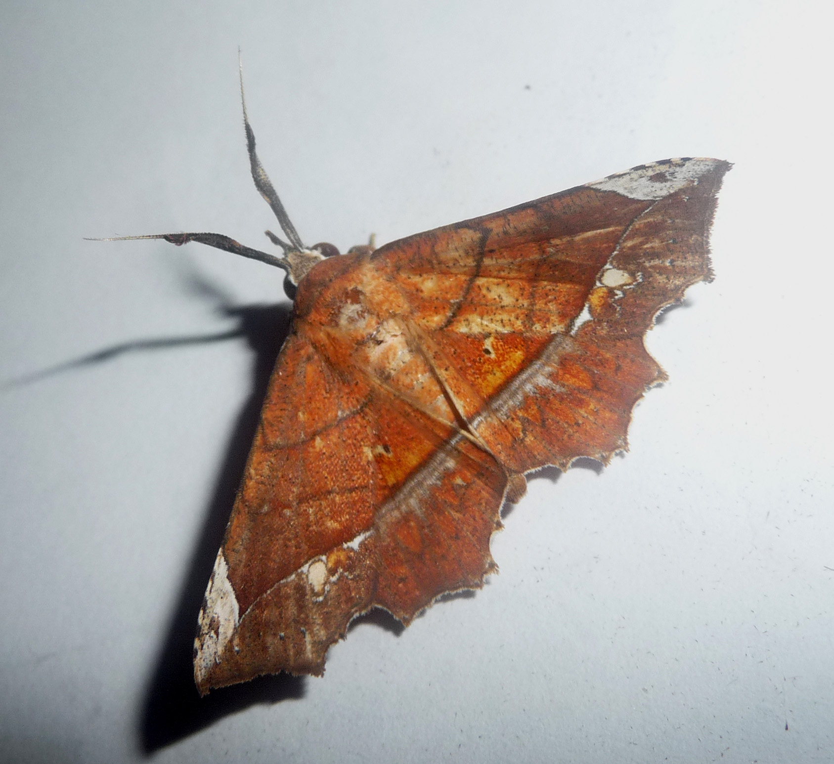 Noctuoidea » Erebidae » Erebinae » Catocalini